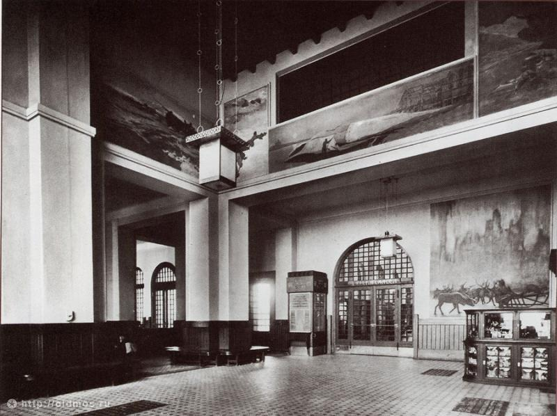 Вестибюль Ярославского вокзала в Москве